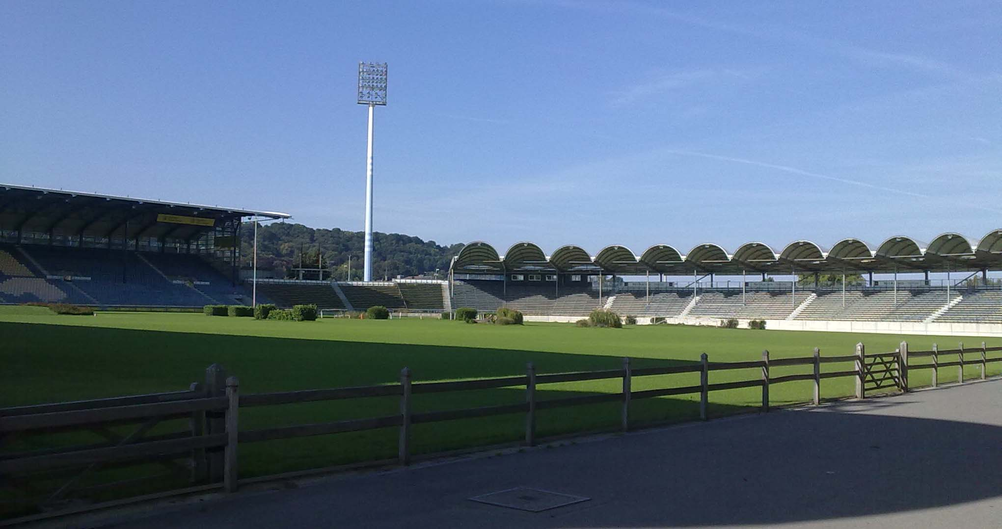 Innenraum des Hauptstadion Aachen